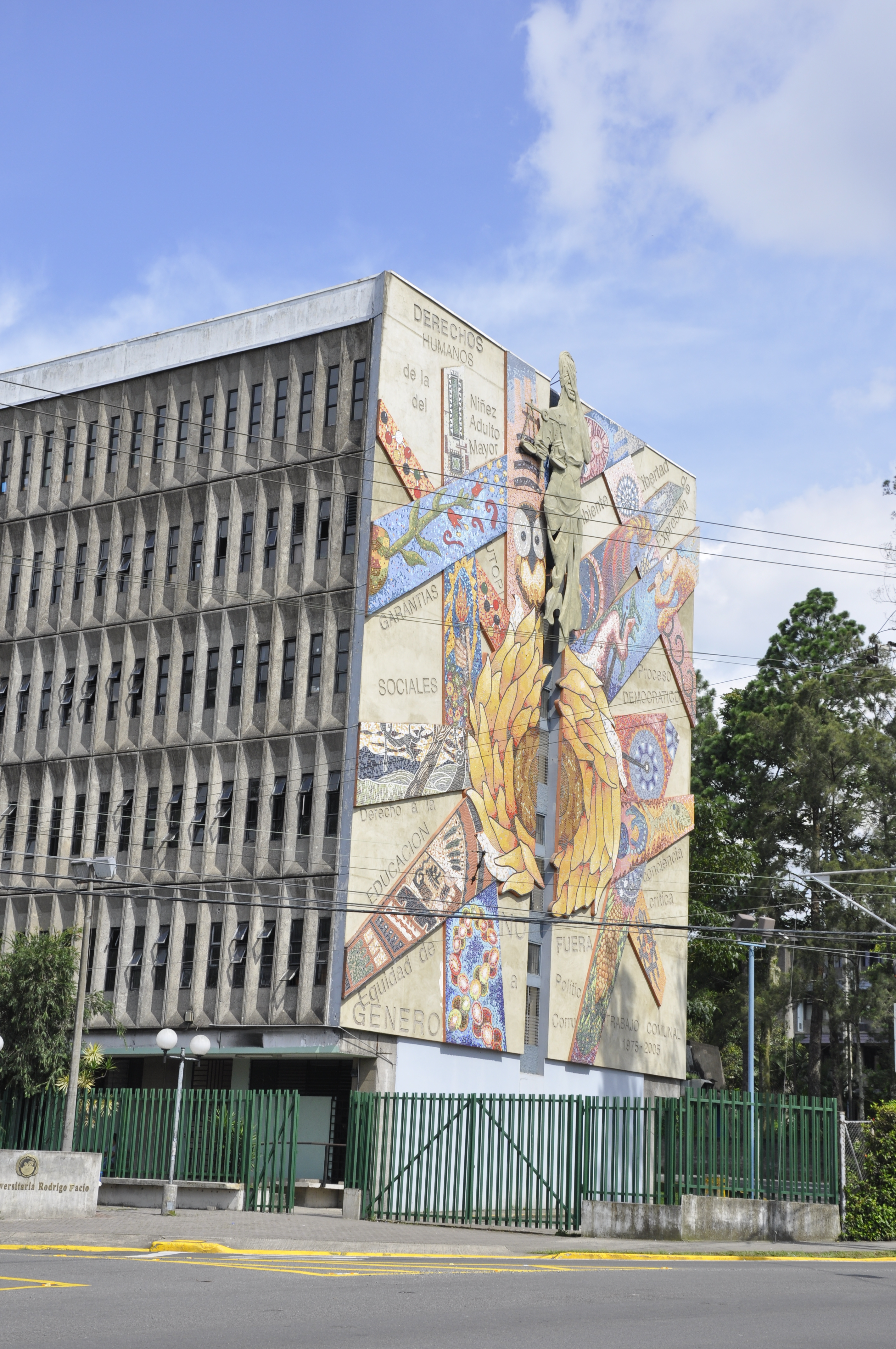 Facultad de Derecho, Universidad de Costa Rica, San Pedro, San José, Costa Rica.